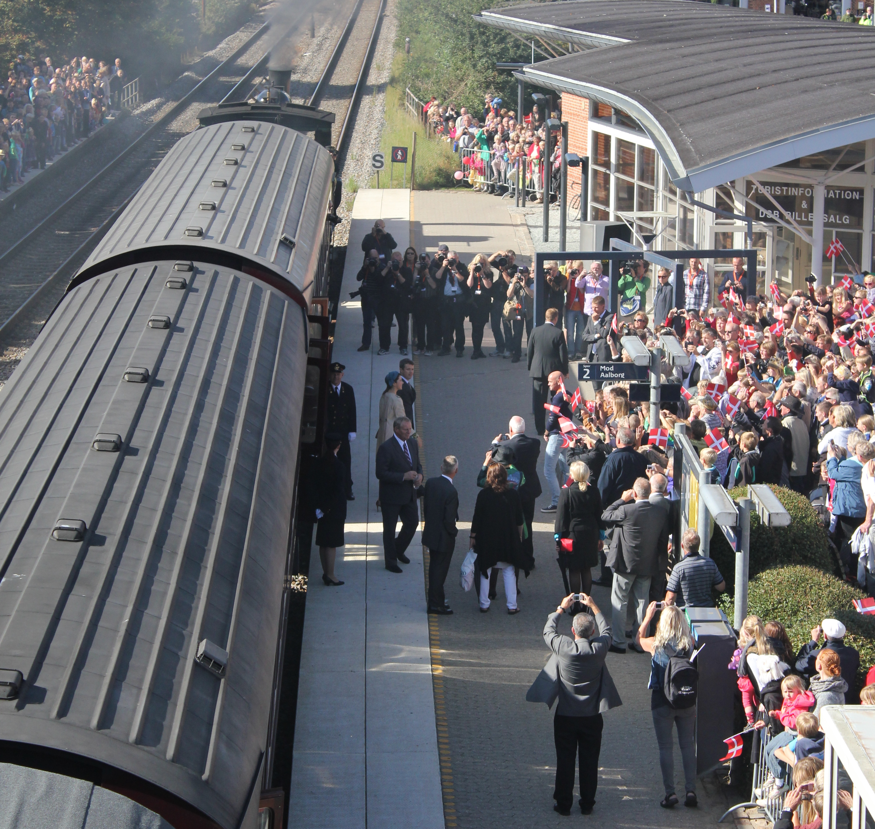 Hadstens 150 års byjubilæum september 2012. I midten ses Kroprinseparret.